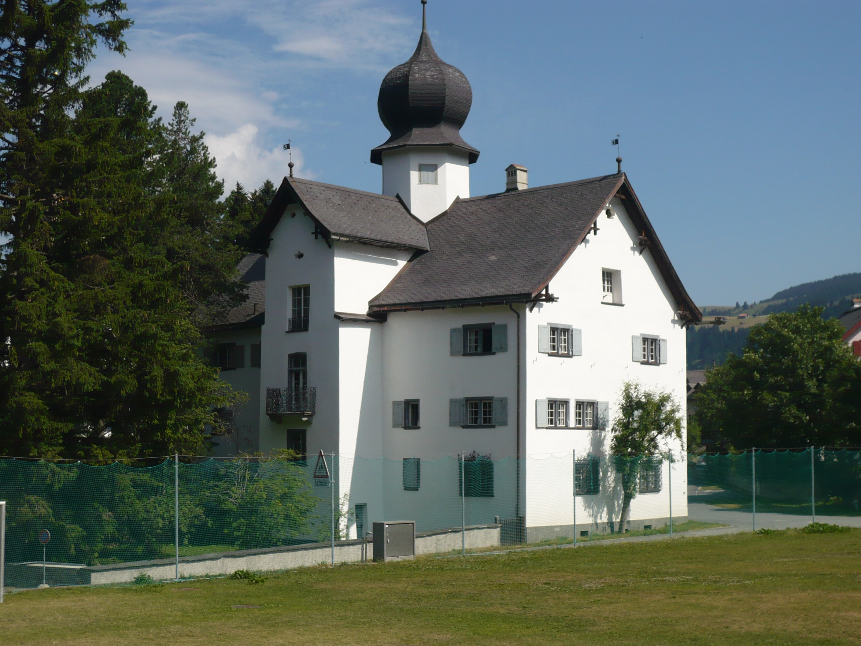 Schlössli Parpan Eingang